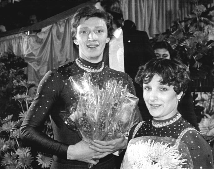 Jelena Walowa, Oleg Wasslijew ADN-ZB Thieme 29.3.83 Karl-Marx-Stadt: ISU-Schaulauf-Tournee- Die Weltmeister und Vize-Europameister im Paarlauf Jelena Walowa-Oleg Wasslijew aus der UdSSR begeisterten am Abend den 28.3.1983 in Karl-Marx-Städter Publikum mit ihren Darbietungen.